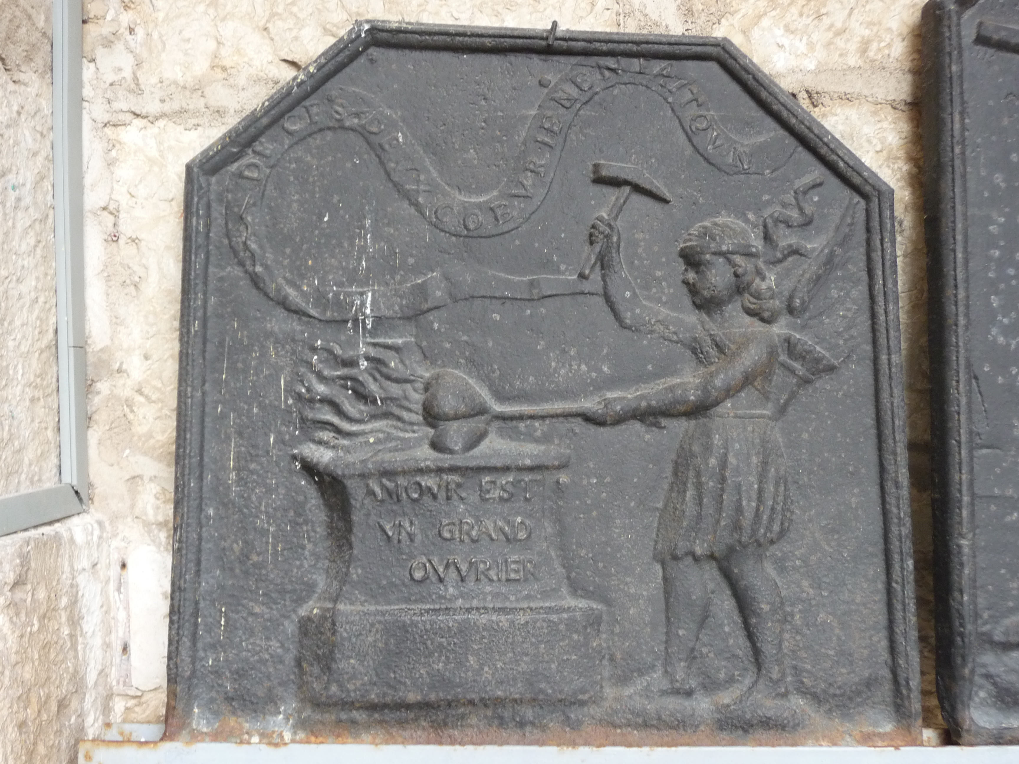 plaque de cheminée présentée à la Citadelle de Besançon.; plaque de cheminée datée du dix-septième siècle : allégorie de l'amour frappant deux coeurs afin de les unir. "AMOUR EST VN GRAND OUVRIER" ; "DE CES DEUX COEVR IE NEN FAIT QVN"